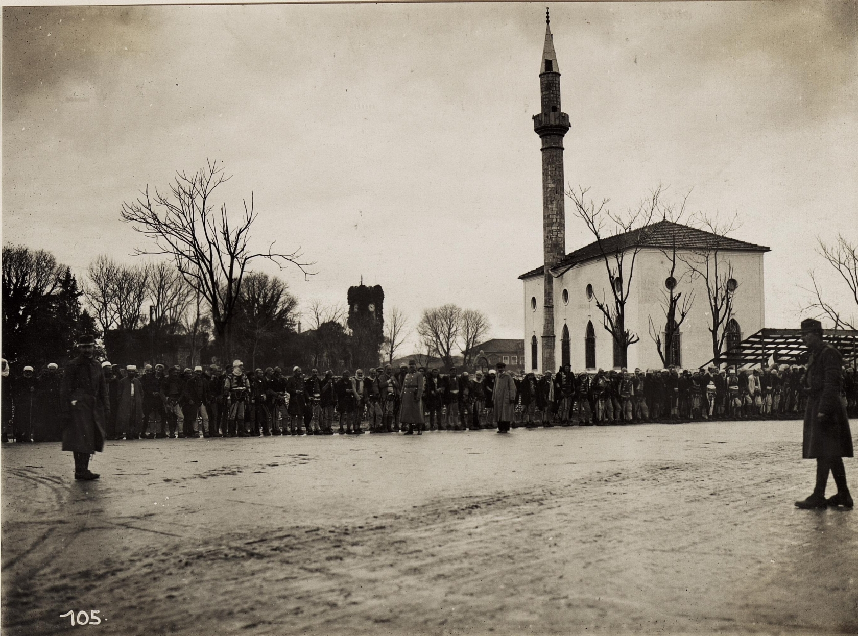 Albanerdeputation vor dem Festungskommando, Skutari.